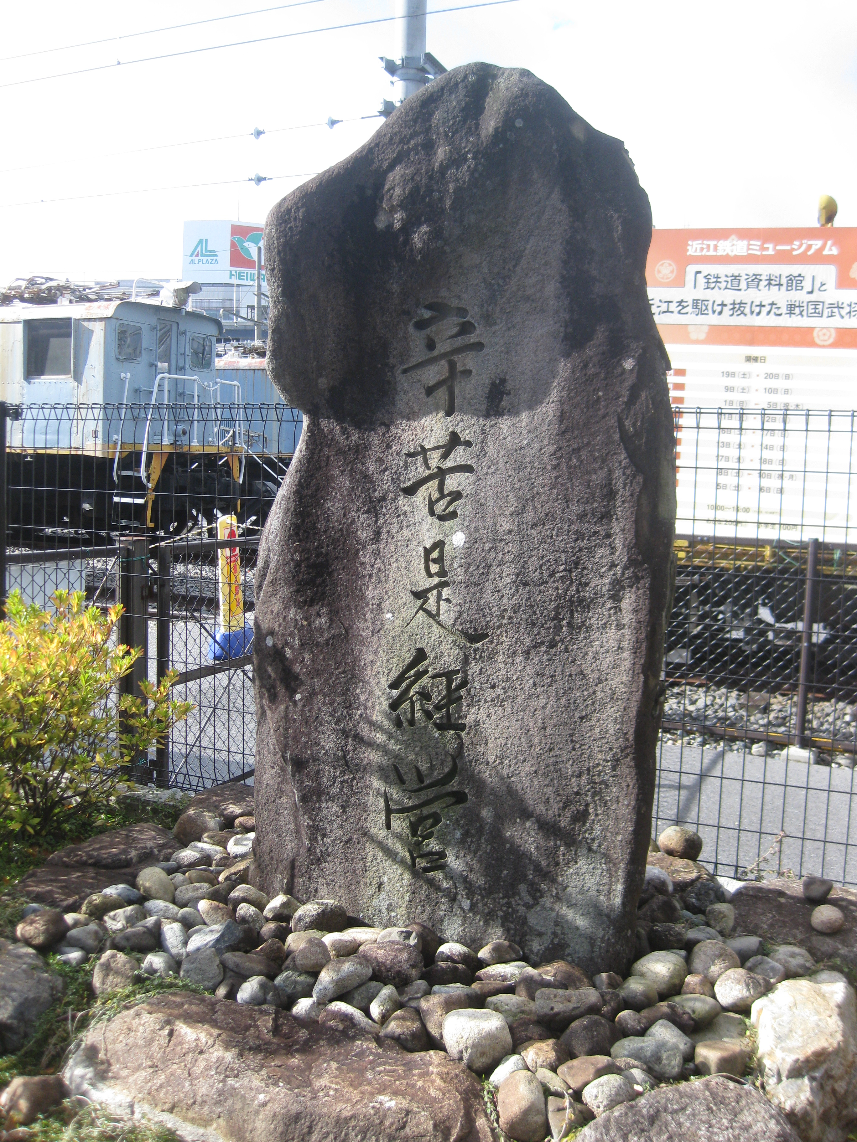 近江鉄道本社横の石碑。